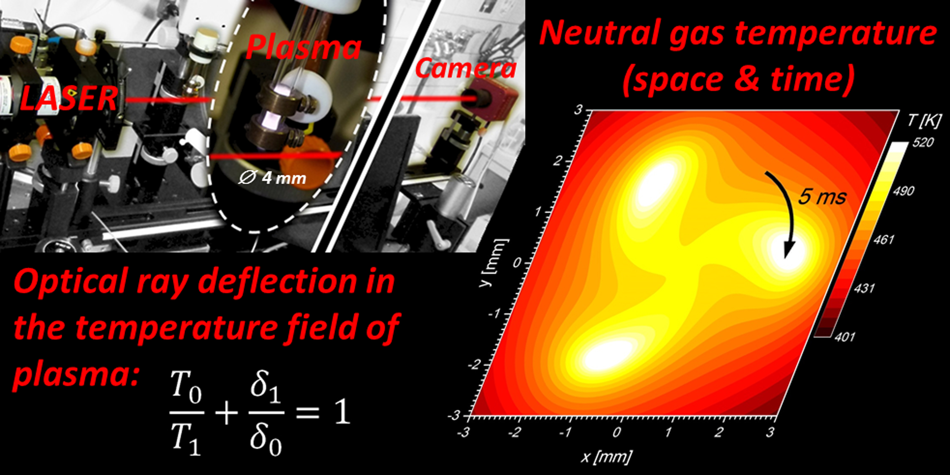 Scheme of Laser Schlieren Deflectometry (LSD) and a representative result of the method obtained for a self-organized non-thermal atmospheric pressure plasma jet (ntAPPJ). The 2D graph shows a cross-section of three hot filaments in perpendicular direction to the gas flow. The model used for the reconstructions of the temperature field considers the Fourier low of heat transfer and rotation of plasma patterns at 30 Hz obtained also by LSD.